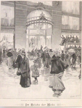 Ansicht des Kaufhauses Gerson am Werderschen Markt Nr. 5 in Berlin im Jahr 1893.